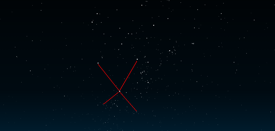 Египетский крест, состоящий из звёзд Процион, Бетельгейзе, Сириус, Наос и Факт